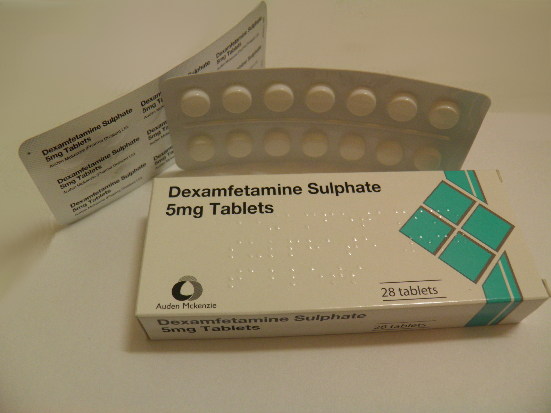 Dekstroamfetamiinisulfaatti